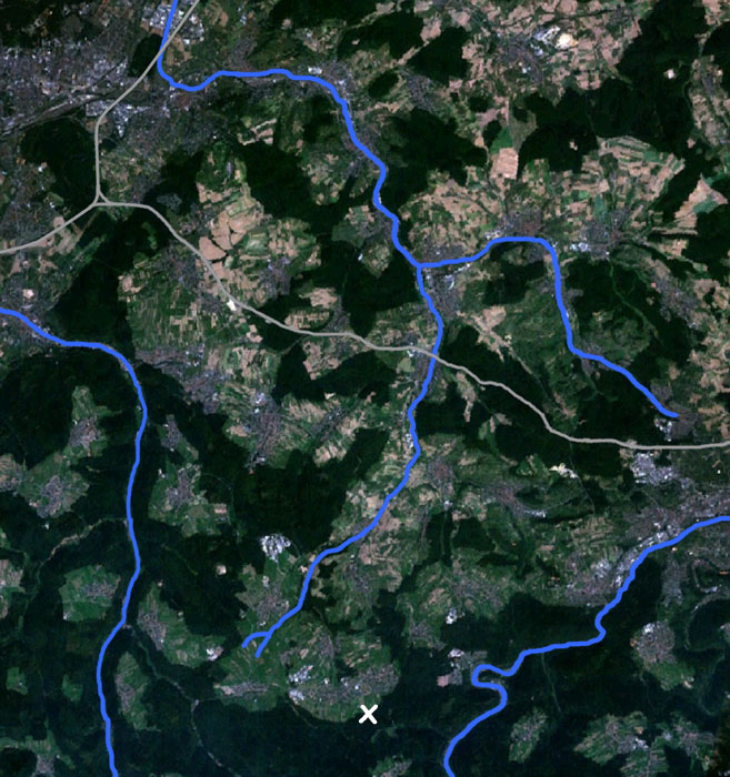 Satellitenfoto des Alb-Pfinz-Plateaus. Links oben befindet sich Karlsruhe, südöstlich davon verläuft die Grenze zur Oberrheinischen Tiefebene. Folgende Details sind hervorgehoben: Bundesautobahn 5 (linkes oberes Eck) Bundesautobahn 8 (in West-Ost-Richtung verlaufend) Die Alb, links unten in Süd-Nord-Richtung fließend Die Enz im rechten unteren Eck Die unterhalb von Ittersbach entspringende Pfinz (untere Bildmitte) und ihr Nebenfluss Kämpfelbach von Osten kommend Die Schwanner Warte ist mit einem weißen X markiert